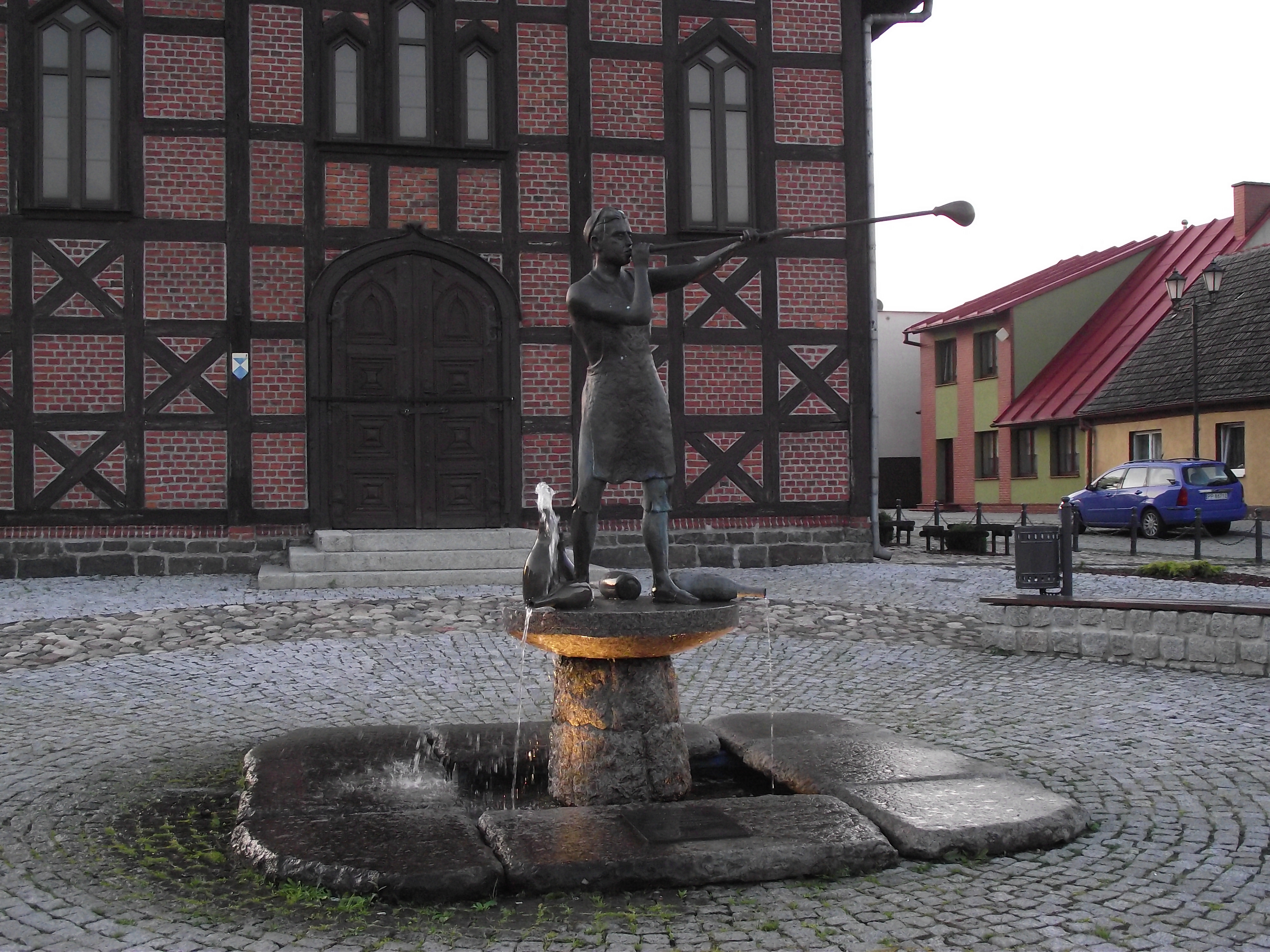 pomnik ufundowany przez mieszkańców Ujścia z okazji 200 - lecia istnienia huty szkła w mieście.Huta powstała w 1809 r., jest najstarszą hutą w Polsce